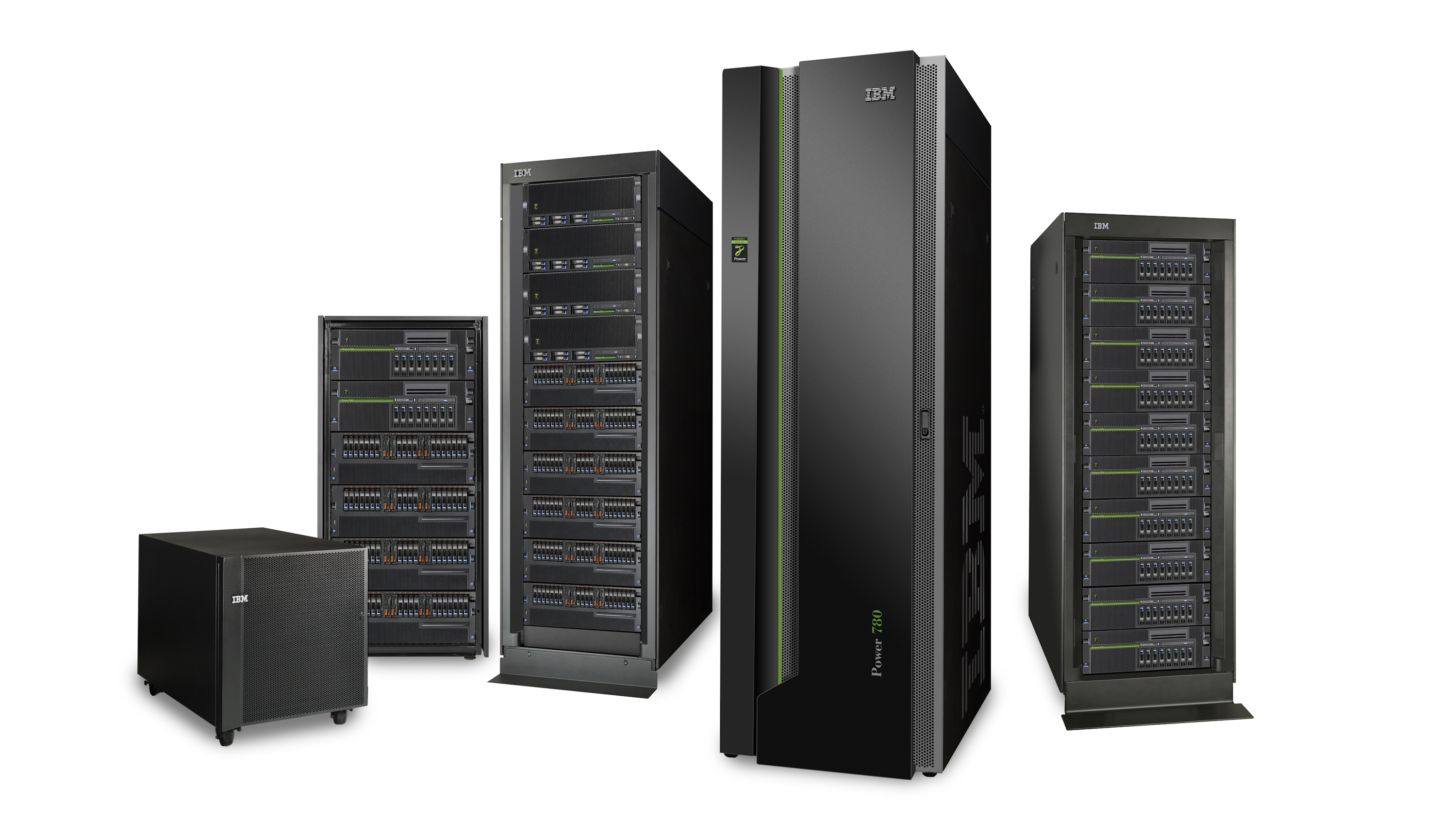 Сімейство POWER7